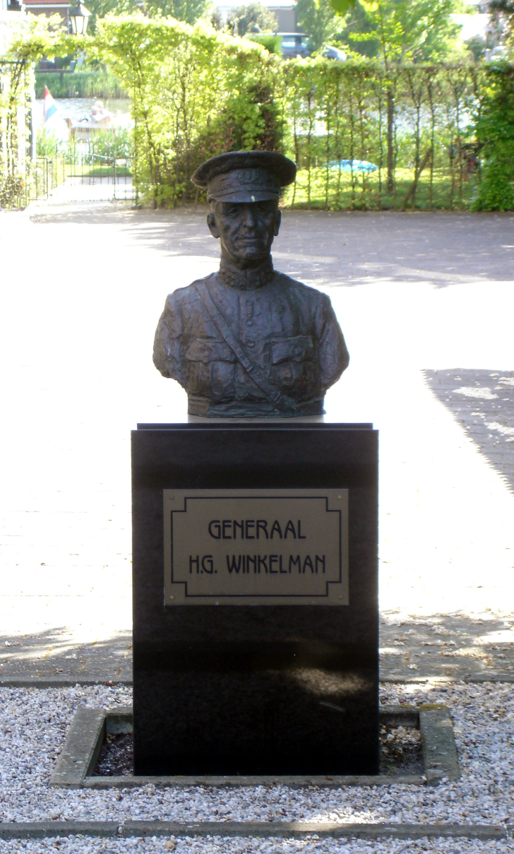 Standbeeld Generaal Winkelman